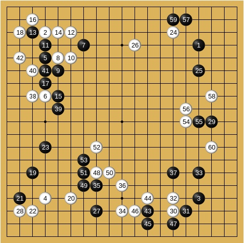 271手完 白1目半勝